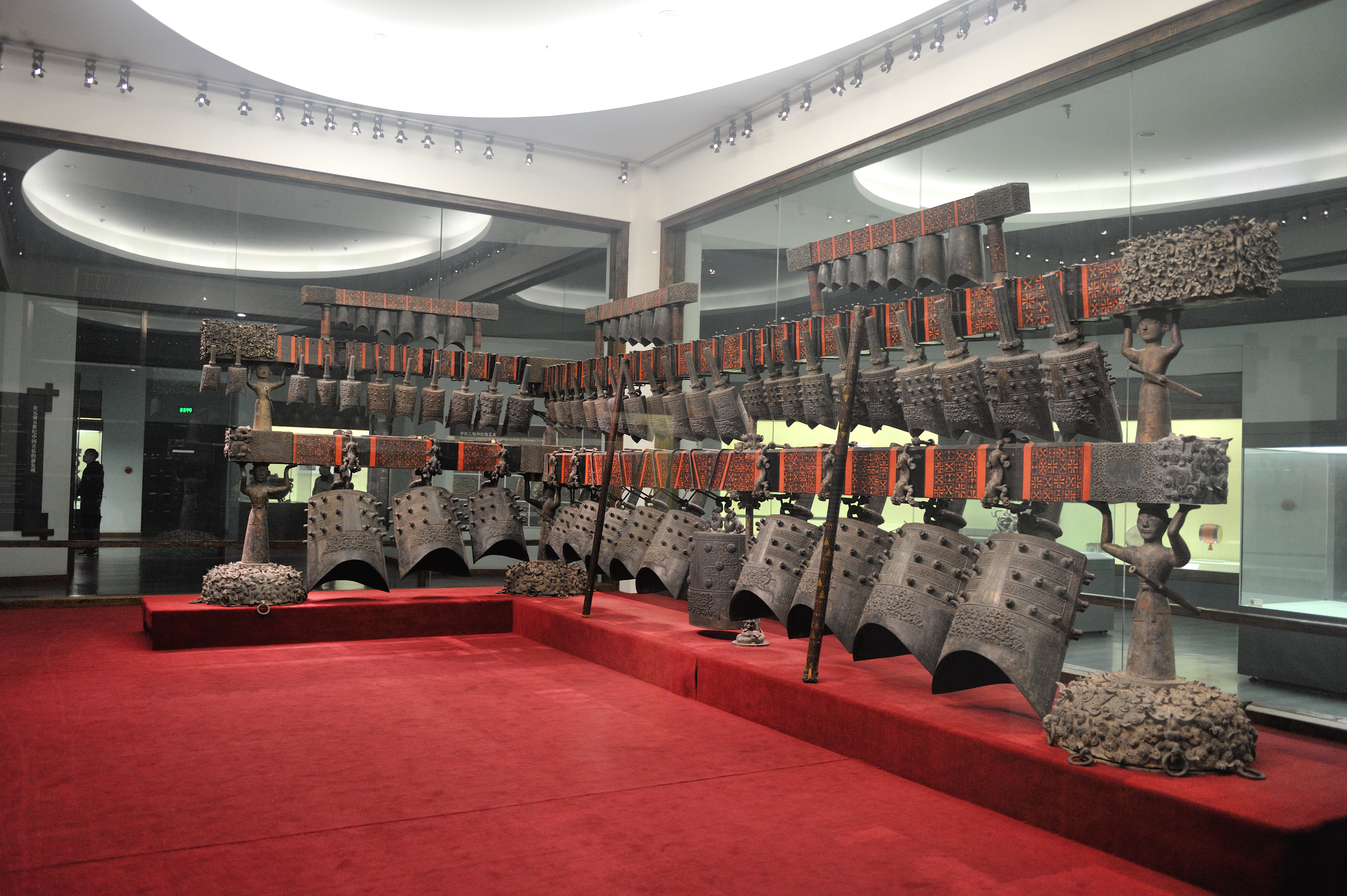 曾侯乙编钟，湖北省博物馆